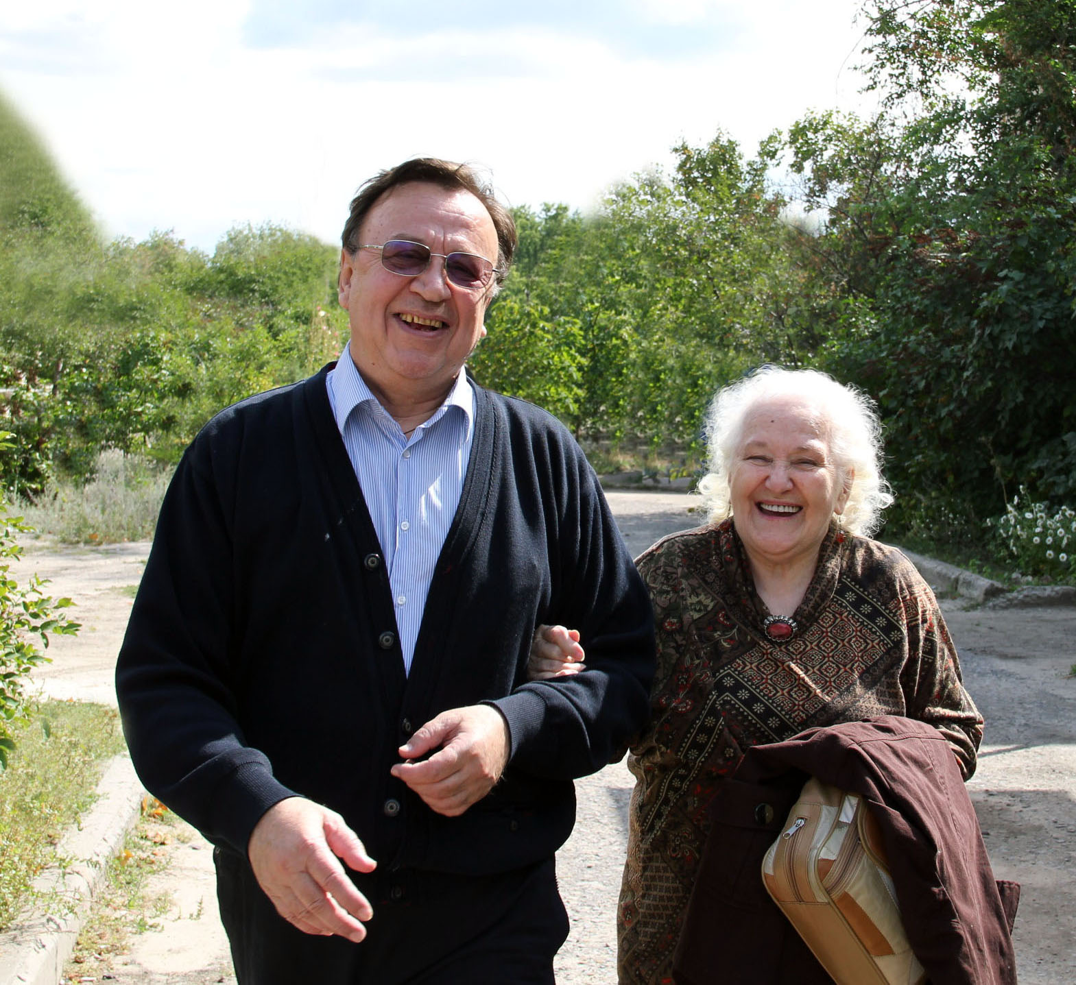 Сентябрь. 2011 г. Вёшенская. Александр Стручков и Светлана Шолохова.